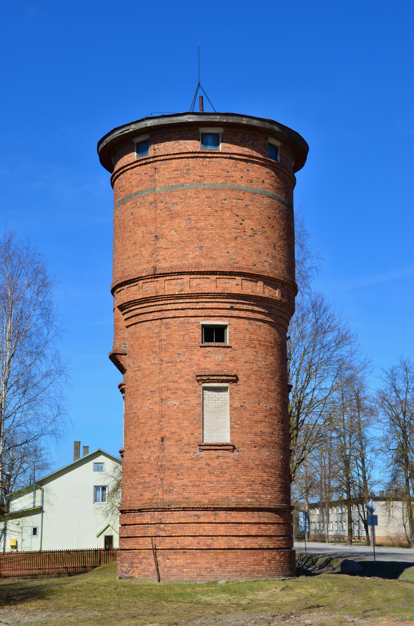 Veetorn Põlva raudteejaama juures